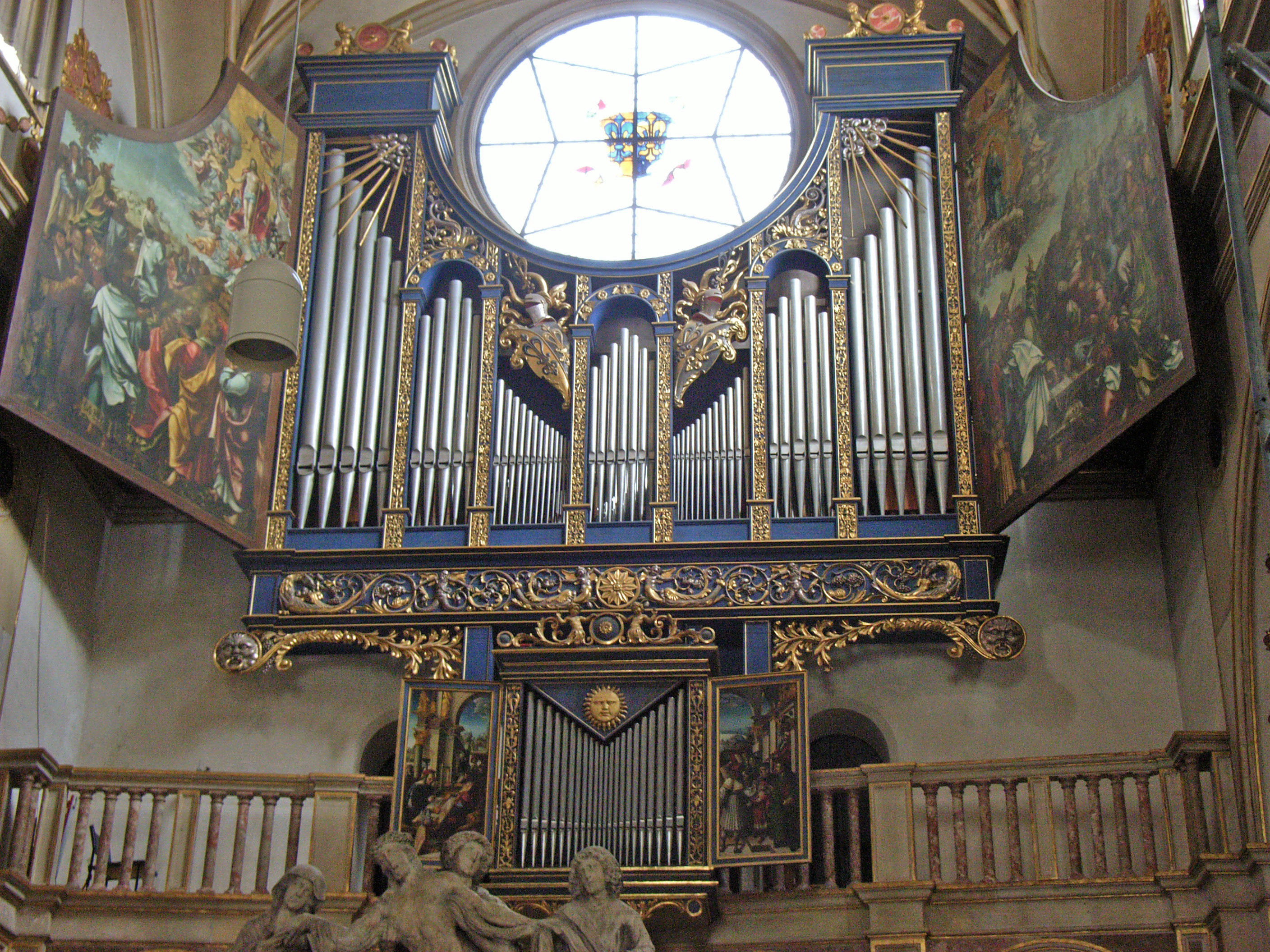 Orgel in St. Anna, Augsburg, Bayern Deutschland